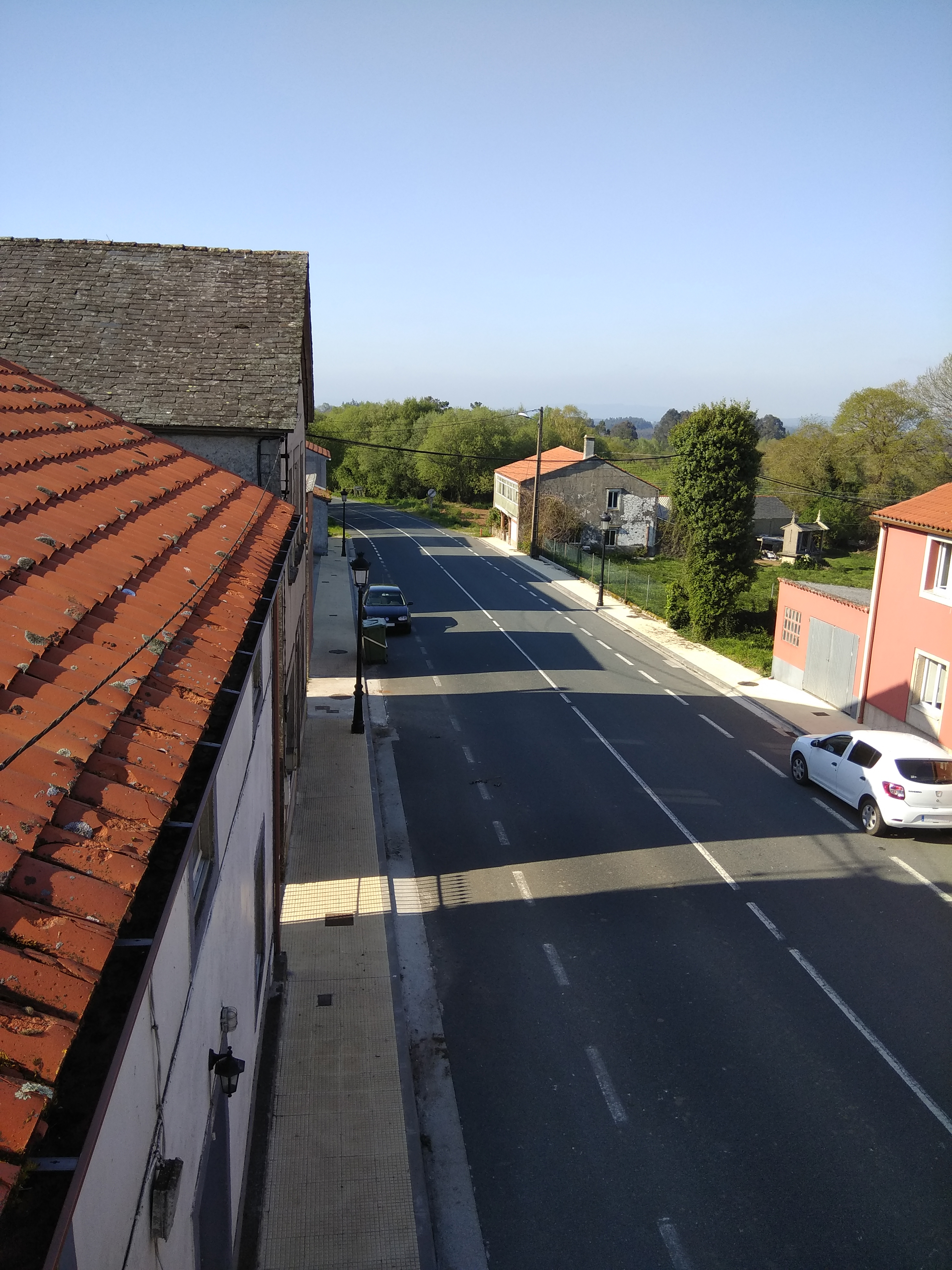 Vista das Cruces (Sobrado, Galiza).